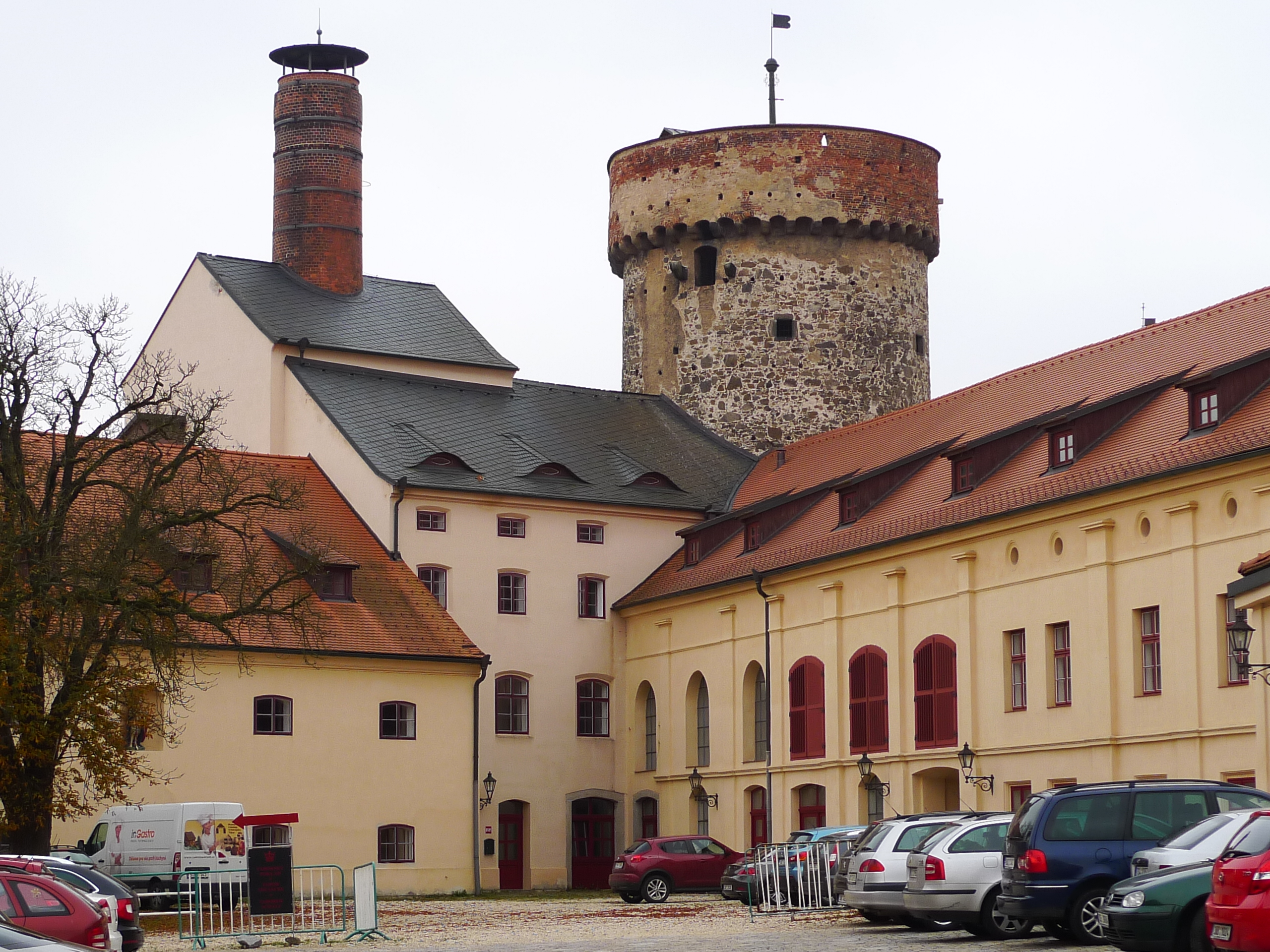 Hrad Kotnov a pivovar (Tábor), Kotnov 127, Tábor, Tábor.